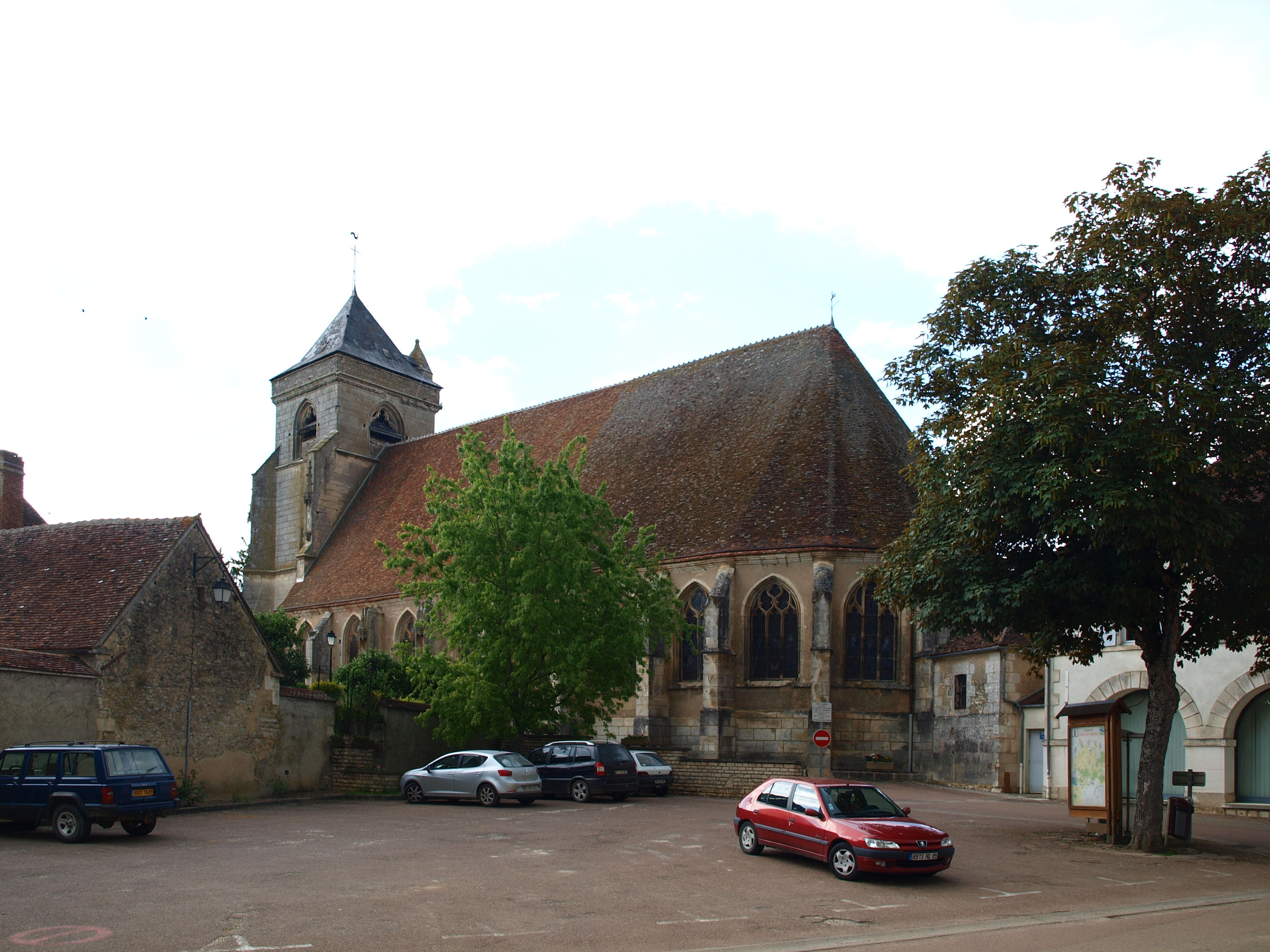 Ouanne (Yonne, France)